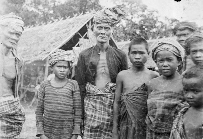 foto. Groepsportret van mannen en kinderen op Boeroe.